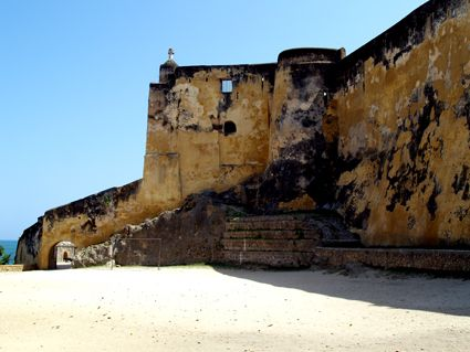 Vlasništvo (poklon suradnice Branke France)